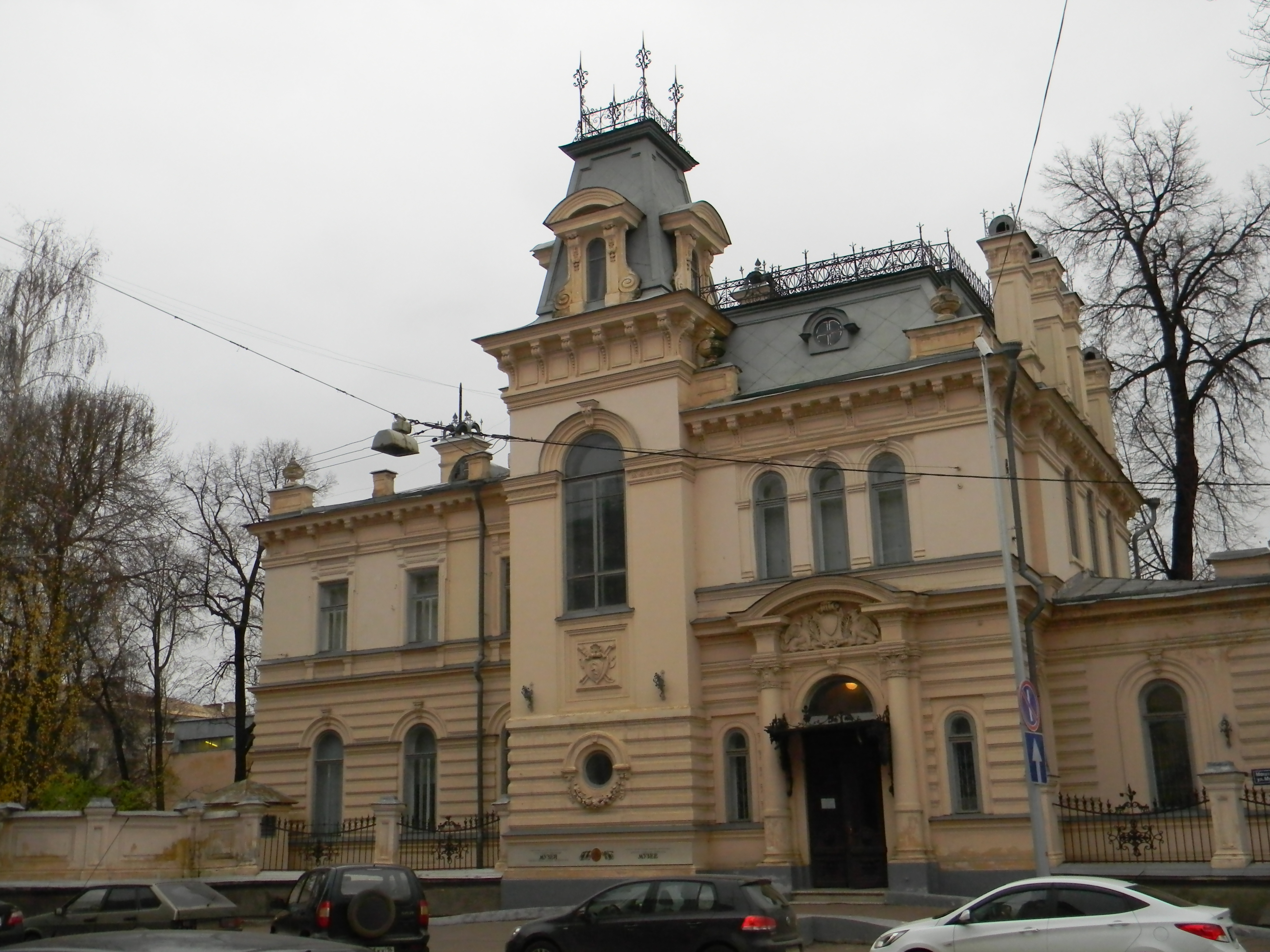 Усадьба сандецкого (Республика Татарстан, Казань, улица Карла Маркса, 64)